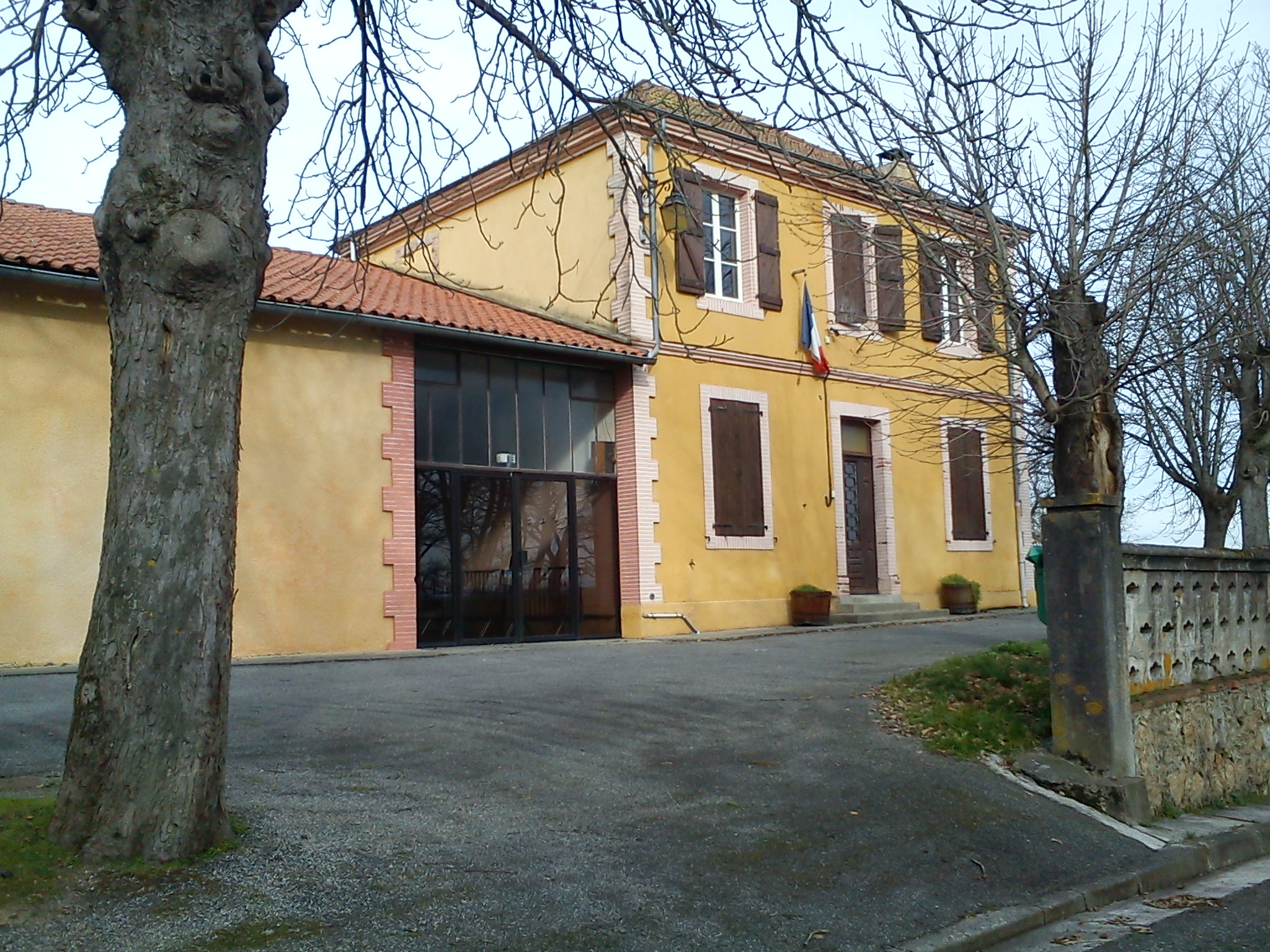 Montégut-Bourjac (mairie)